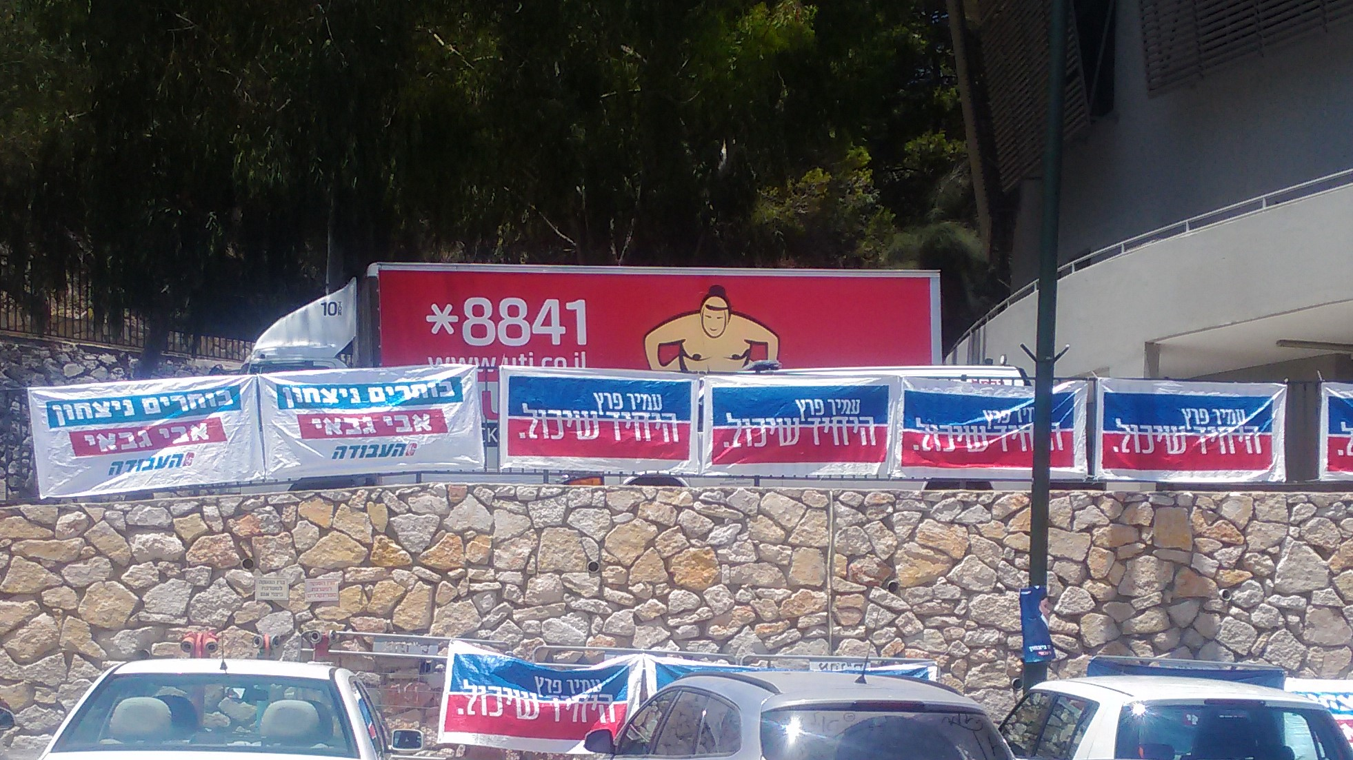 שלטי תמיכה מחוץ לקלפי במהלך הבחירות ליו"ר מפלגת העבודה, 2017